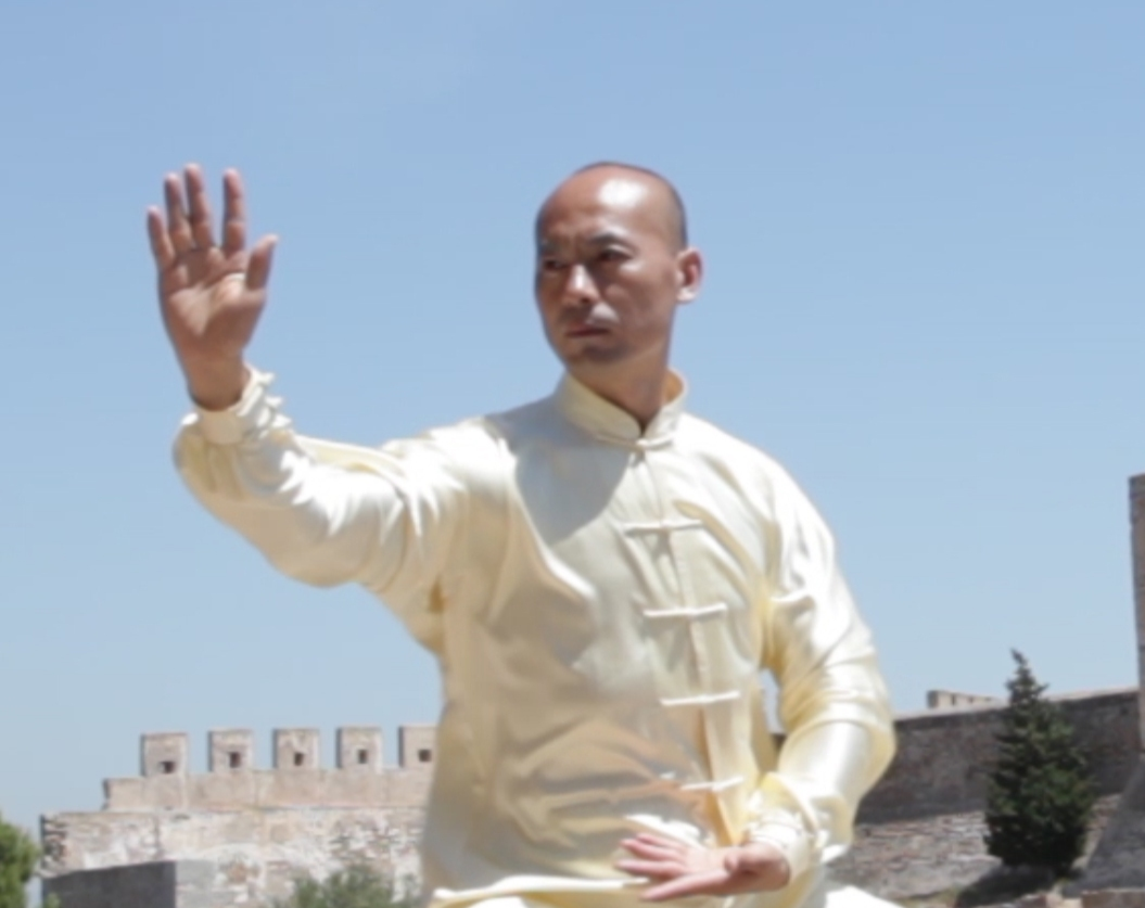 Dr. Wang Xiaojun